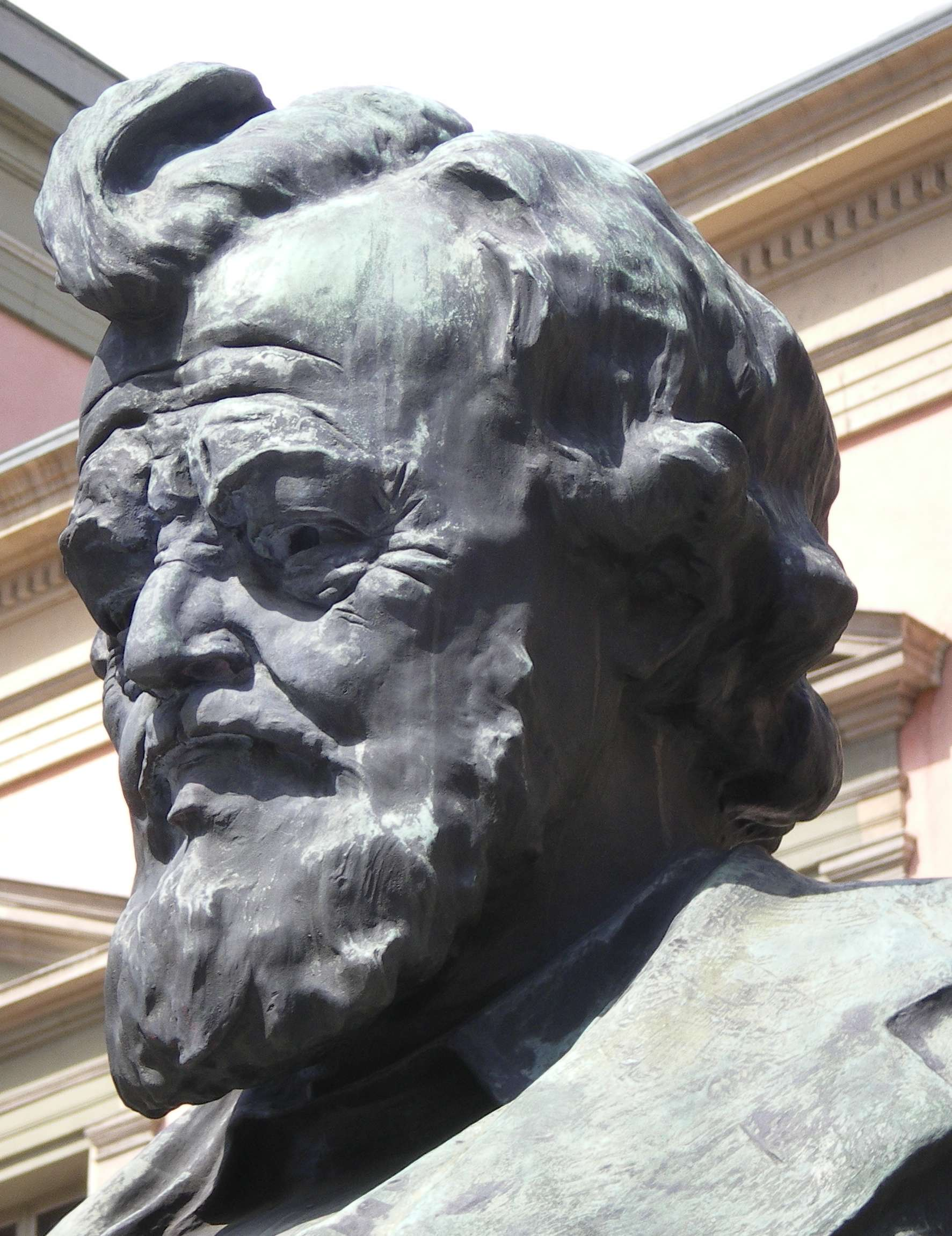 photographie d'une sculpture en bronze à l'effigie de Carl Vogt située devant l'entrée principale de l'université des Bastions à Genève